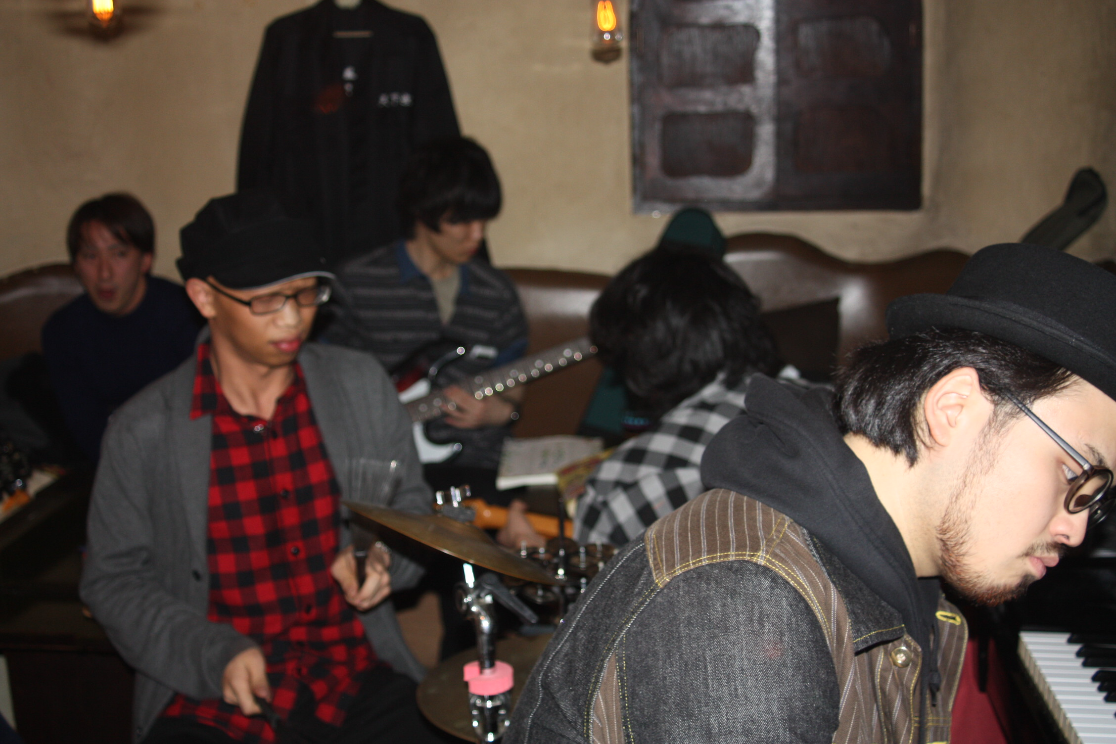 オープンマイクの様子（新宿二丁目 ライブバーロシナンテ にて）